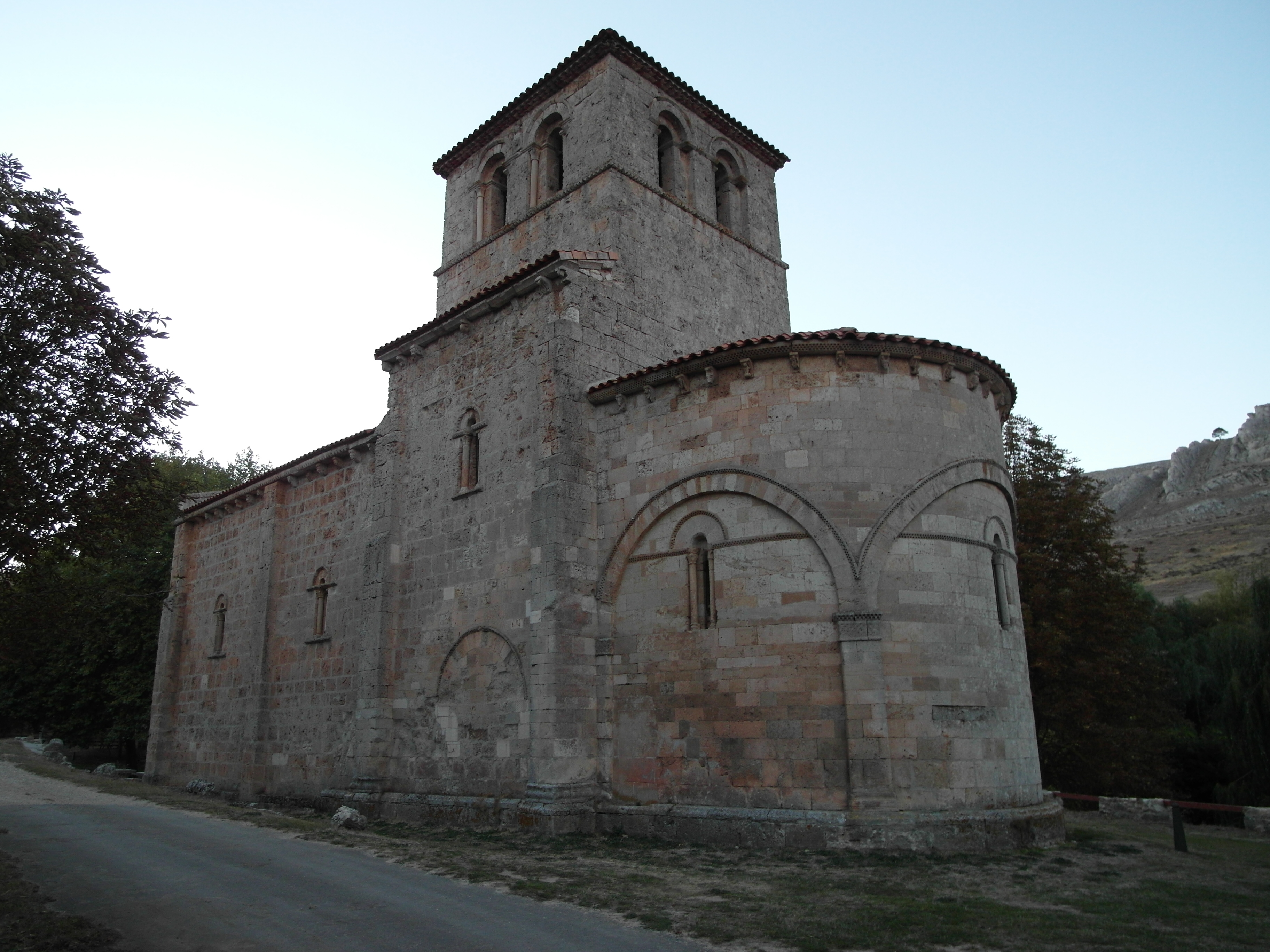 La ermita románica de Nuestra Señora del Valle, Monasterio de Rodilla, Burgos.